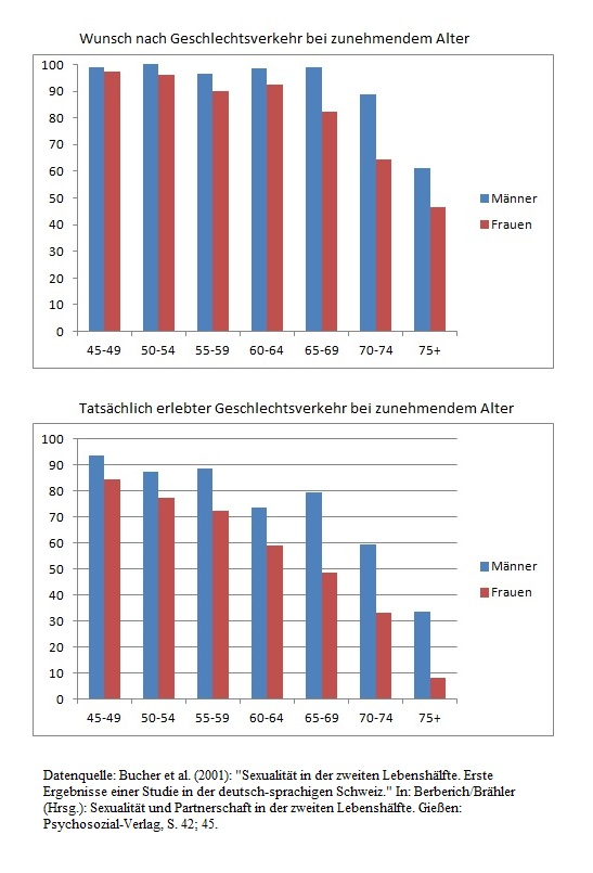 Vergleich zwischen gewünschter und tatsächlicher erlebter sexueller Aktivität in Bezug auf Geschlechtsverkehr. Datenquelle: Bucher et al. (2001): „Sexualität in der zweiten Lebenshälfte. Erste Ergebnisse einer Studie in der deutsch-sprachigen Schweiz.“ In: Hermann Berberich; Elmar Brähler (Hrsg.): Sexualität und Partnerschaft in der zweiten Lebenshälfte. Gießen: Psychosozial-Verlag, S. 42; 45.